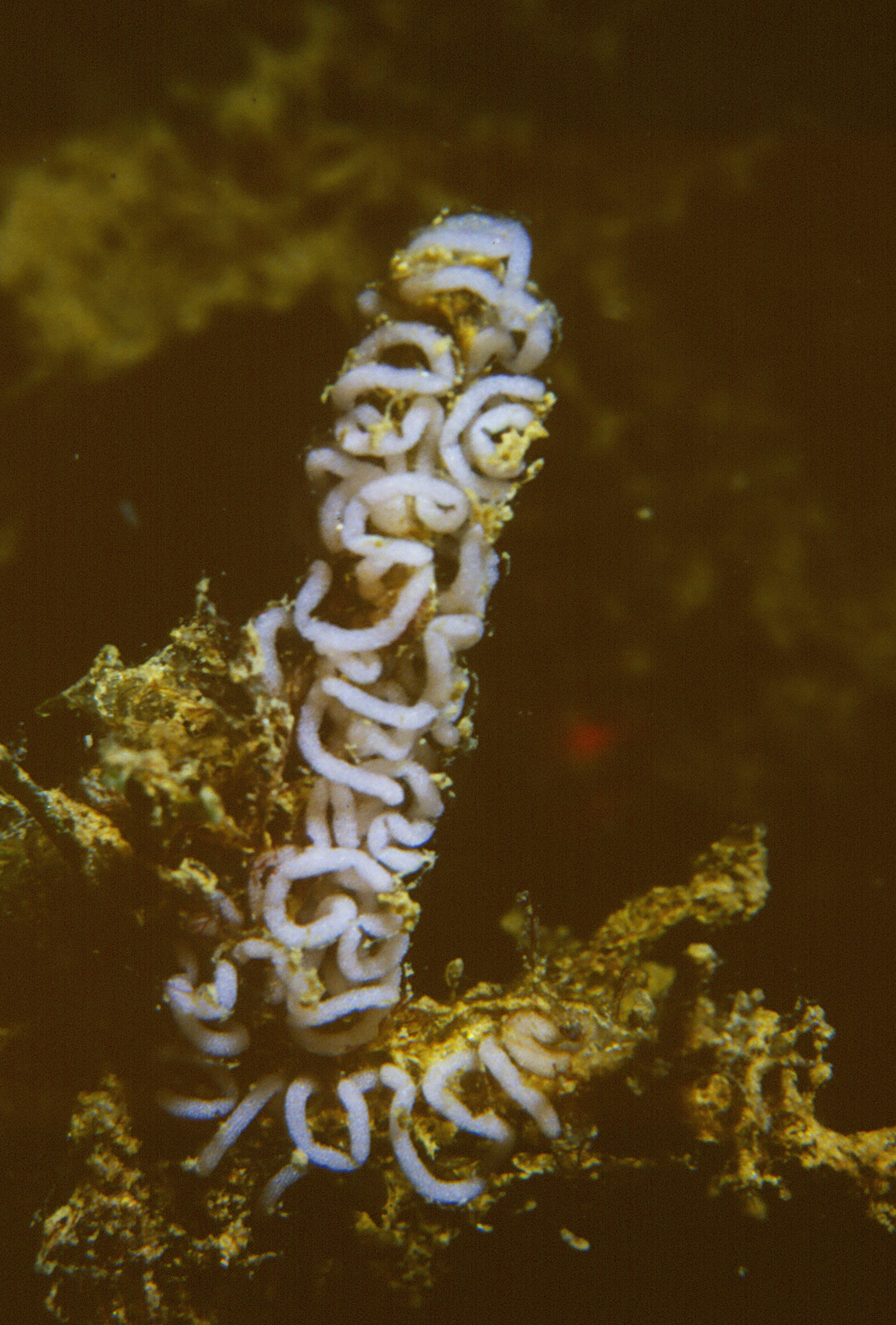 Flabellina babai ponte - Banyuls-sur-Mer : 07/94